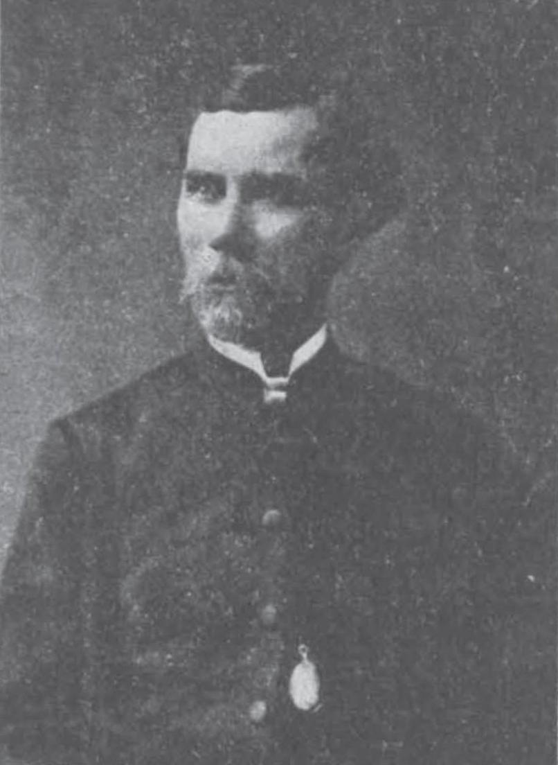 griechischer Kirchengründer 19. Jahrhundert